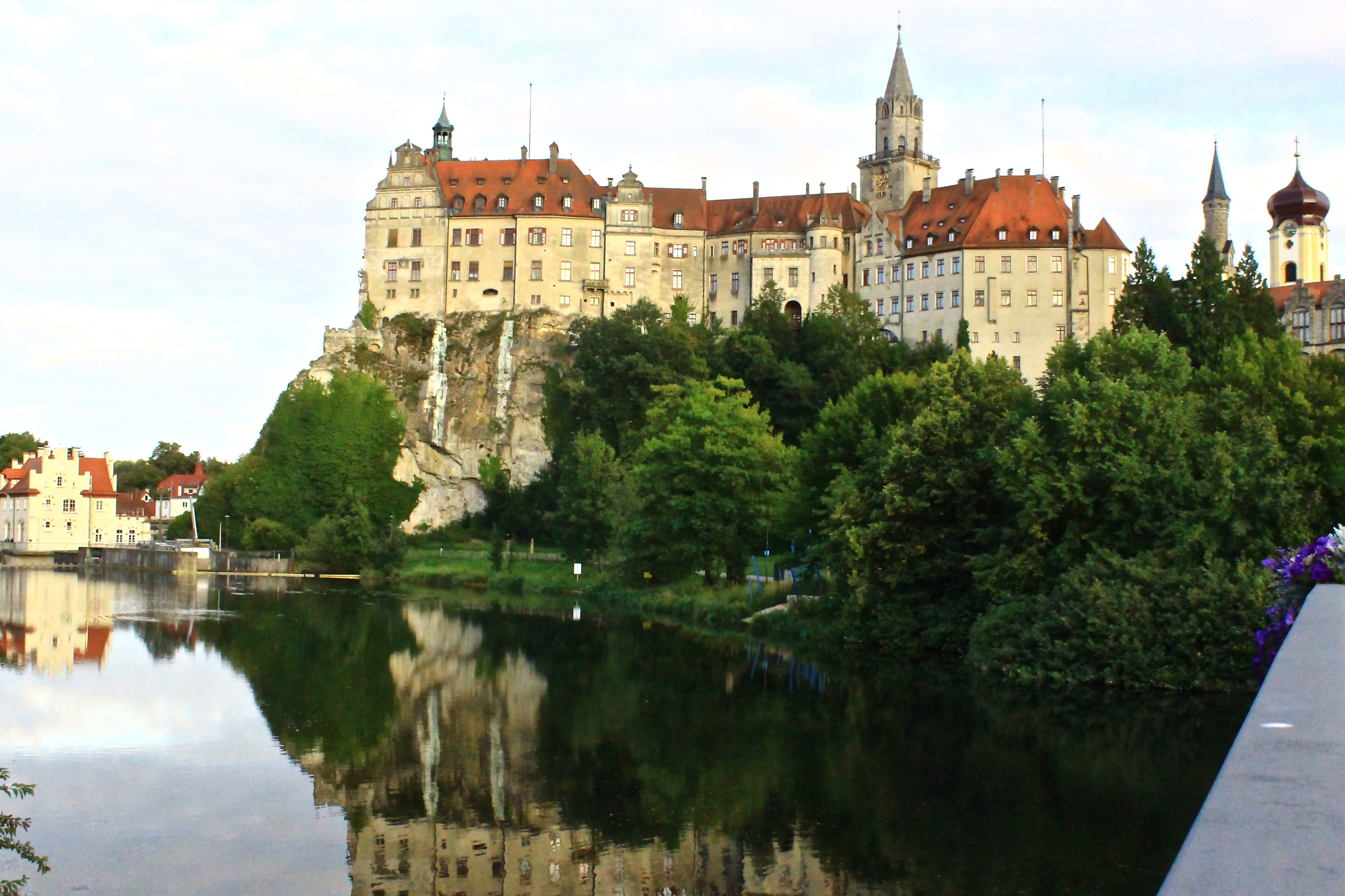 Schloss Sigmaringen